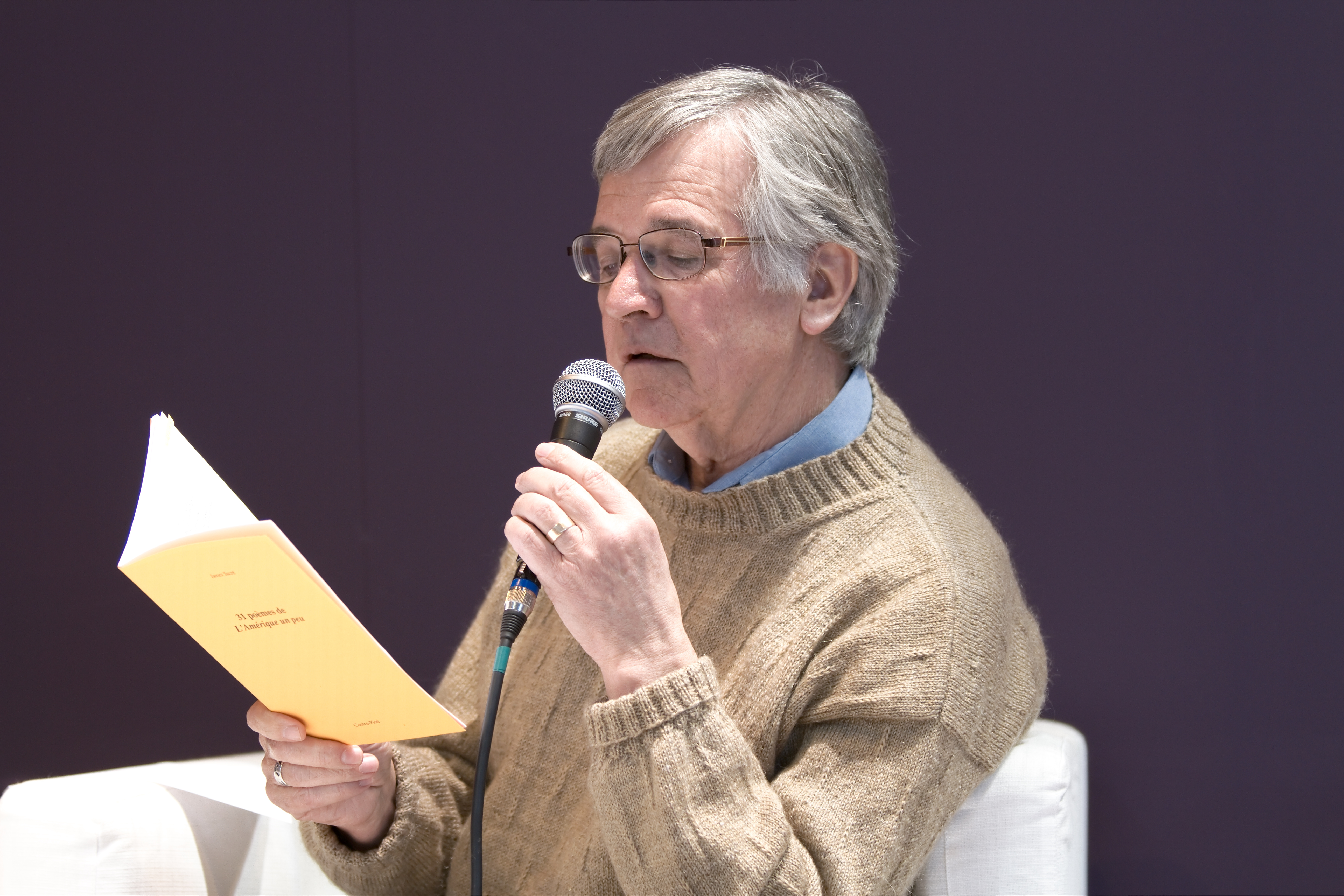 James Sacré au Salon du livre de Paris lors d'une table ronde sur les Territoires littéraires : les Amériques.